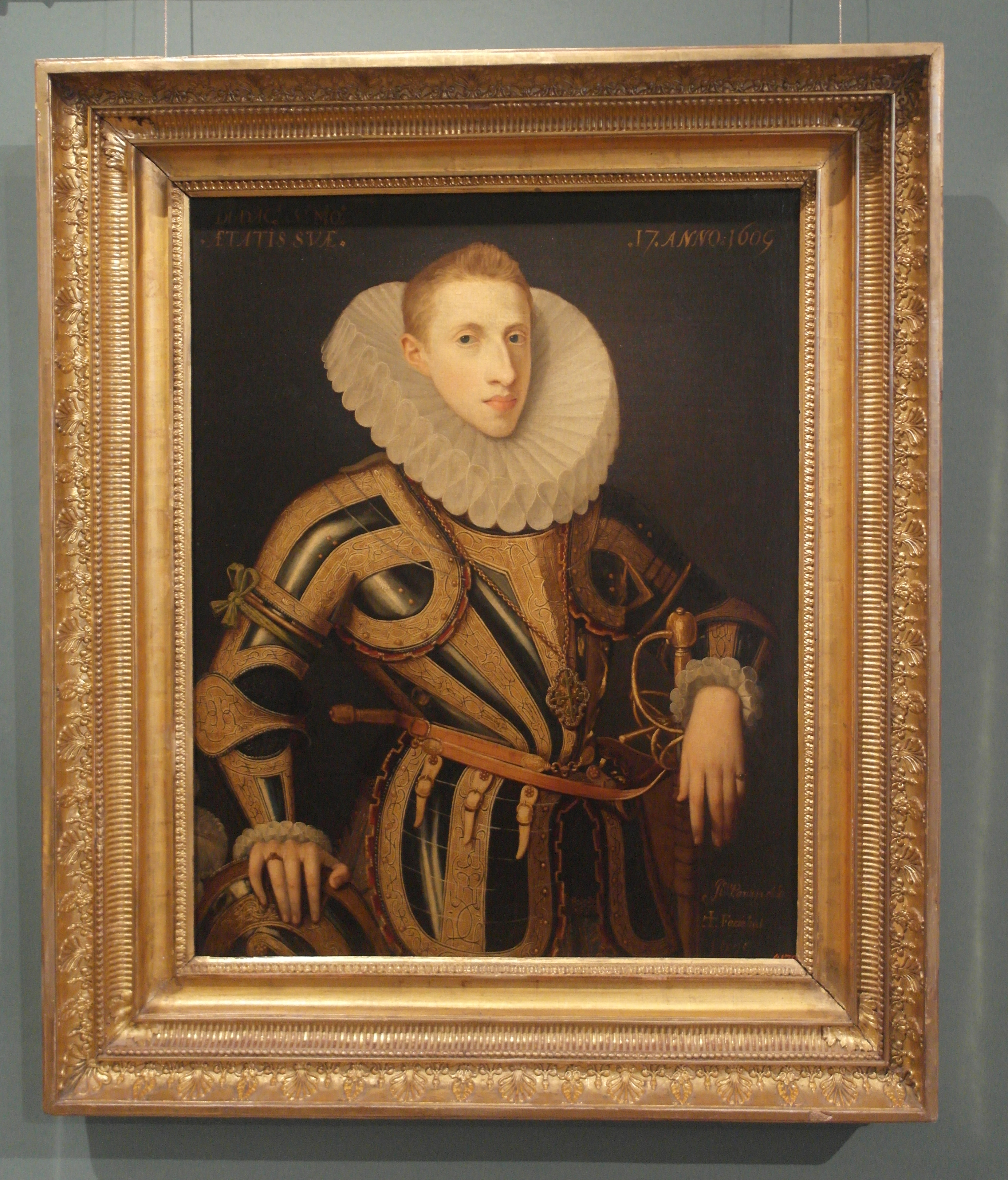 Новый Эрмитаж, зал 240 - Картина Пантохи "Портрет Диего де Вильямайора"